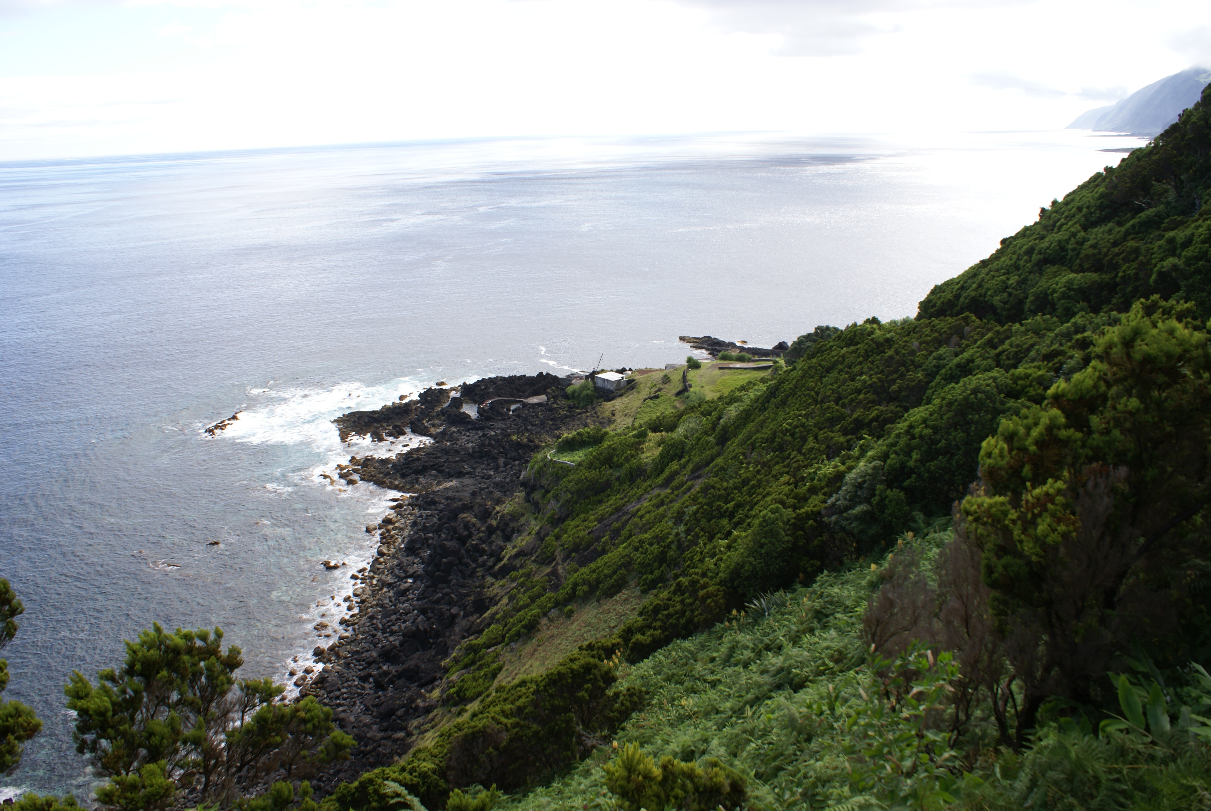 Fajã da Ponta Grossa ou do Mero, Norte Pequeno, Calheta, ilha de São Jorge, Açores